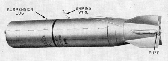 Amerykańska bomba kasetowa M35